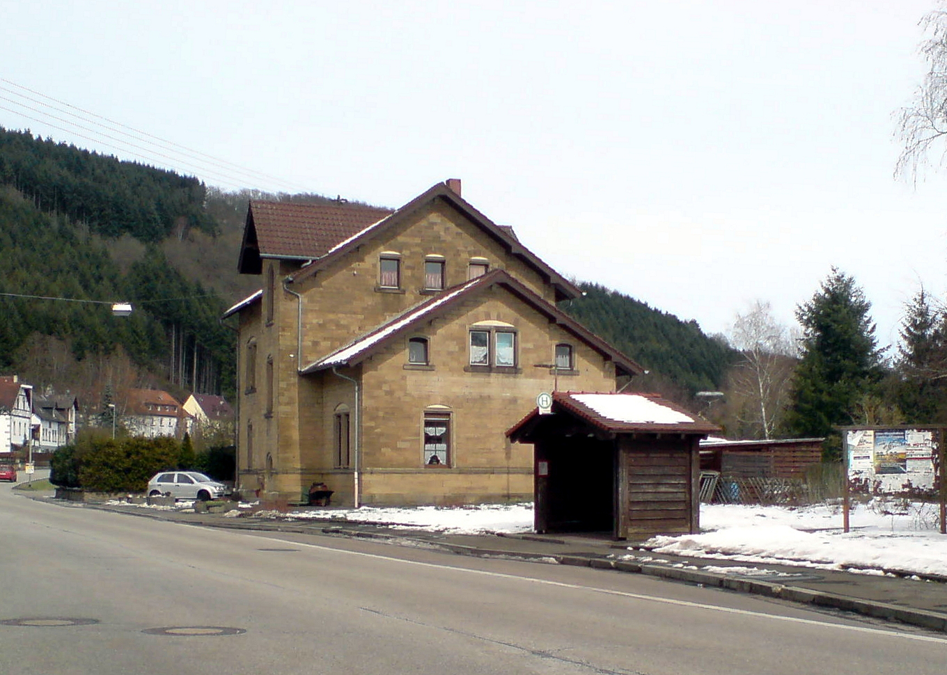 Der Bahnhof Offenbach-Hundheim an der Glantalbahn.